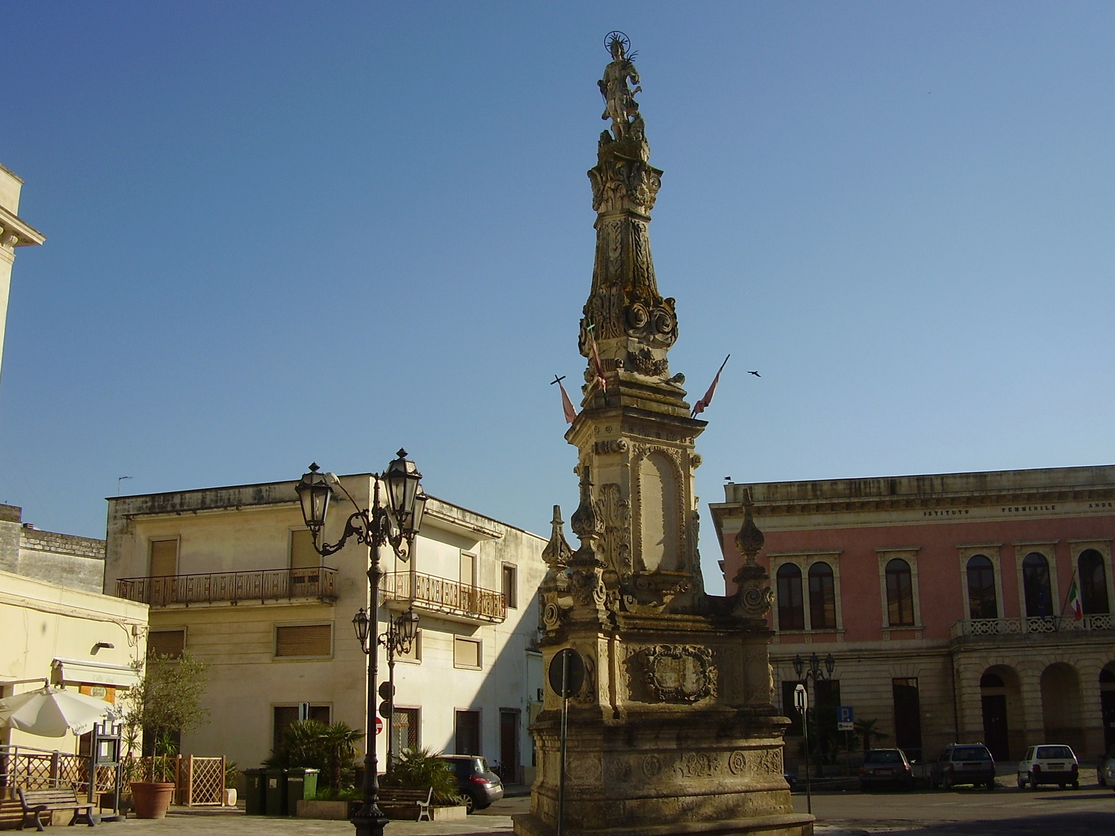 Guglia San Vito Lequile, Lecce